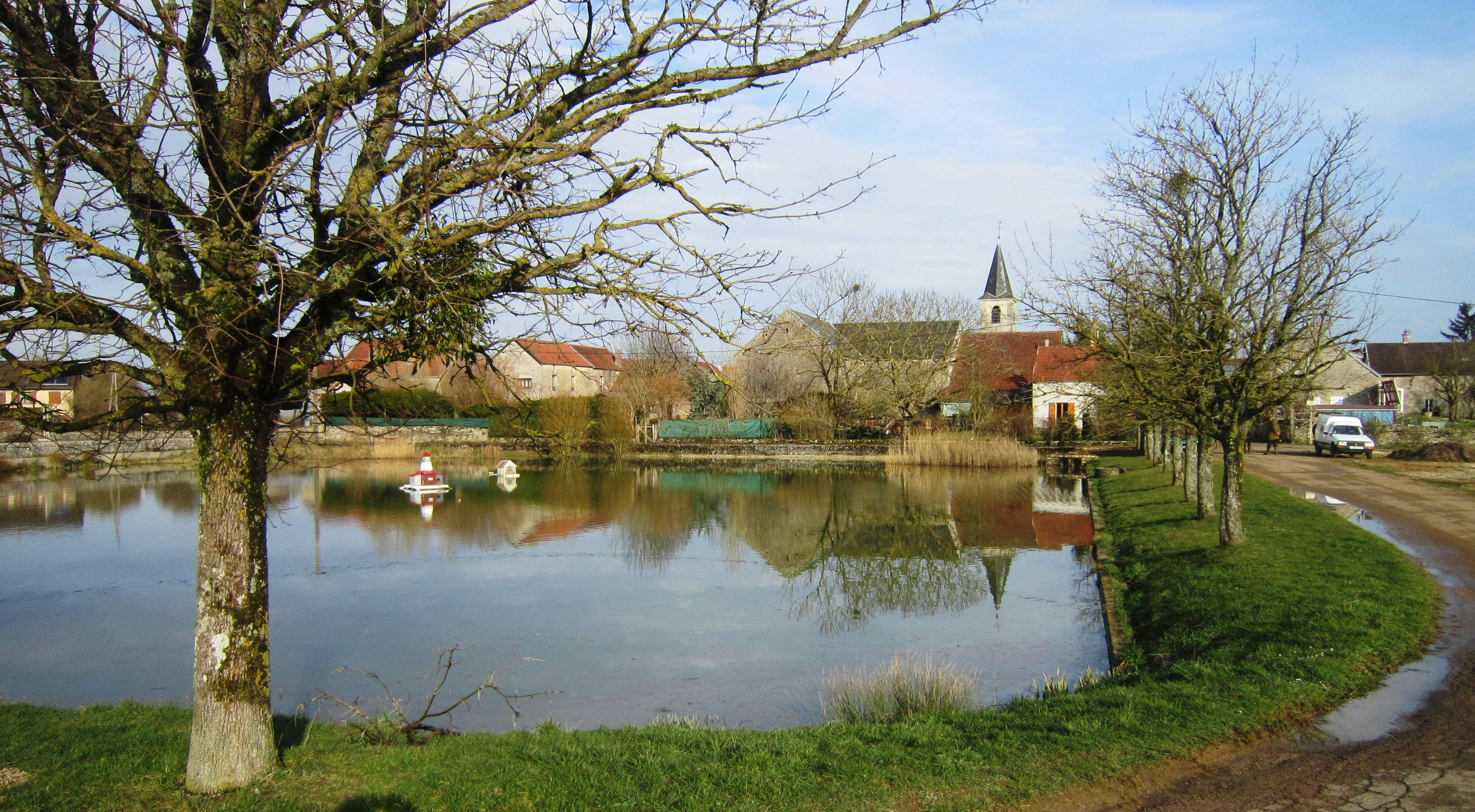 Village de Cérilly ('Côte-d'Or